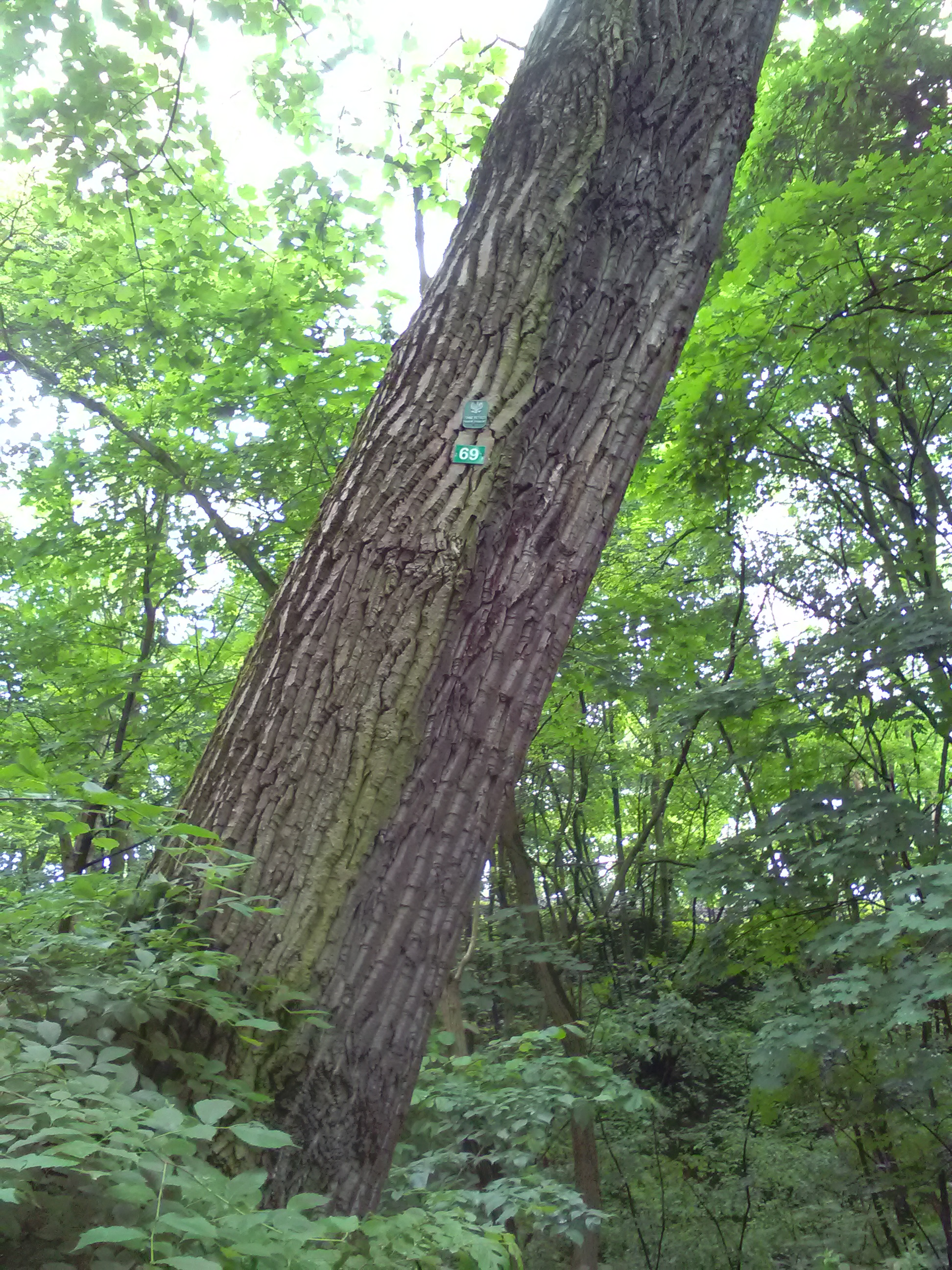 Drzewo pomnik przyrody w użytku ekologicznym Dębina w Poznaniu.